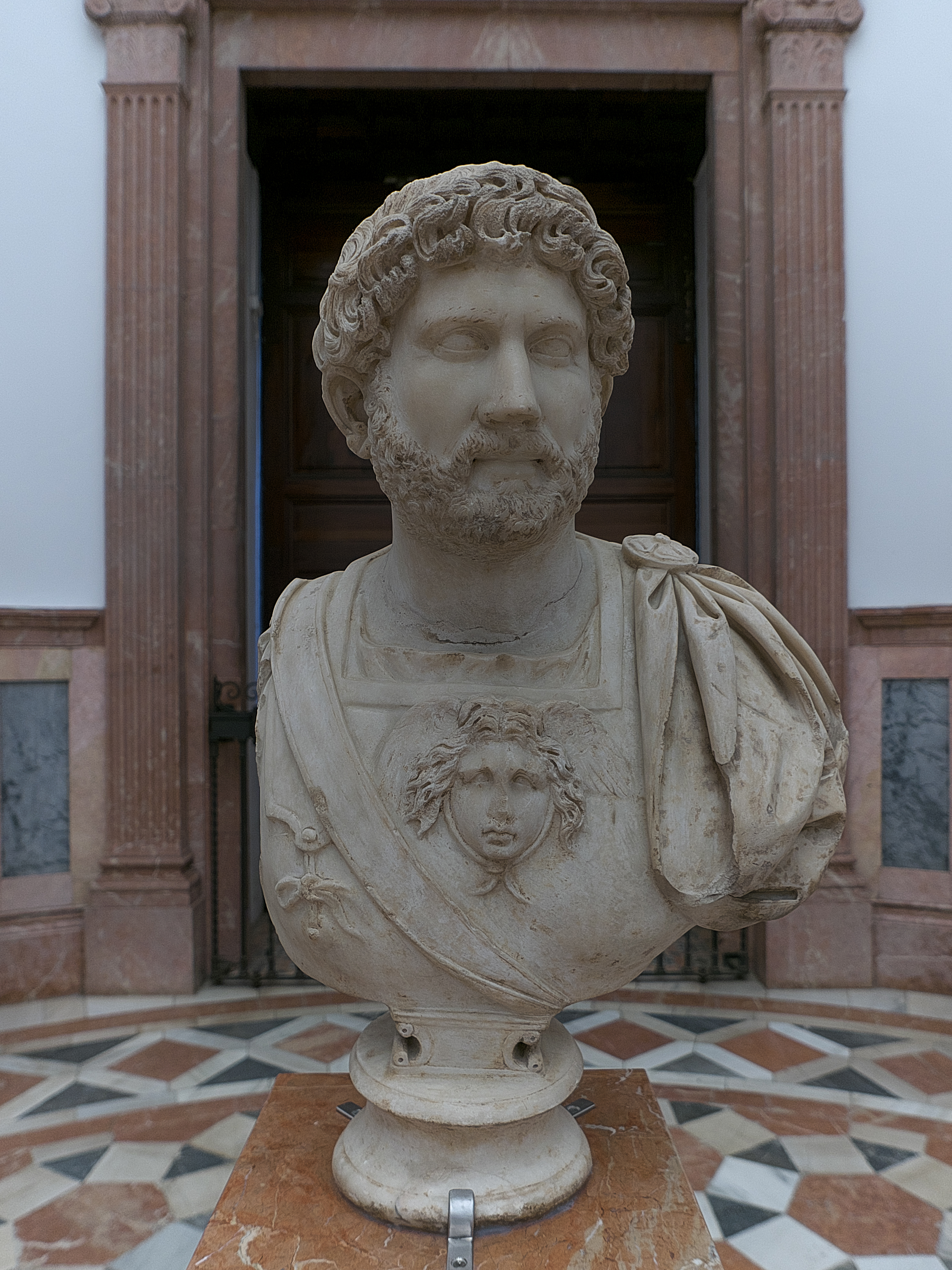 Museo Arqueológico de Sevilla. Busto de Adriano, esculpido en mármol pentélico blanco (135-140). Procedente de Itálica.